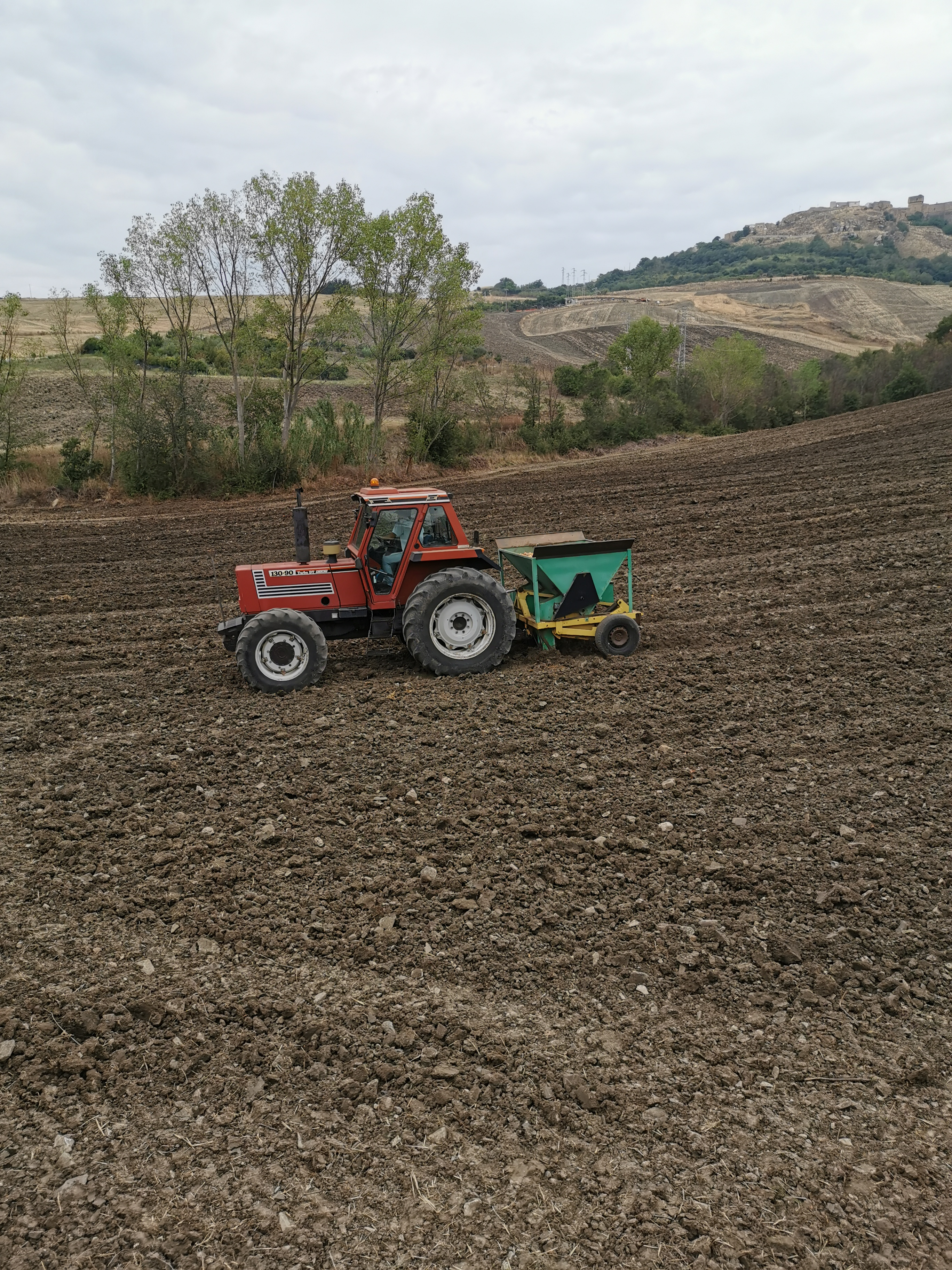 trattore impegnato nella semina di cipolle